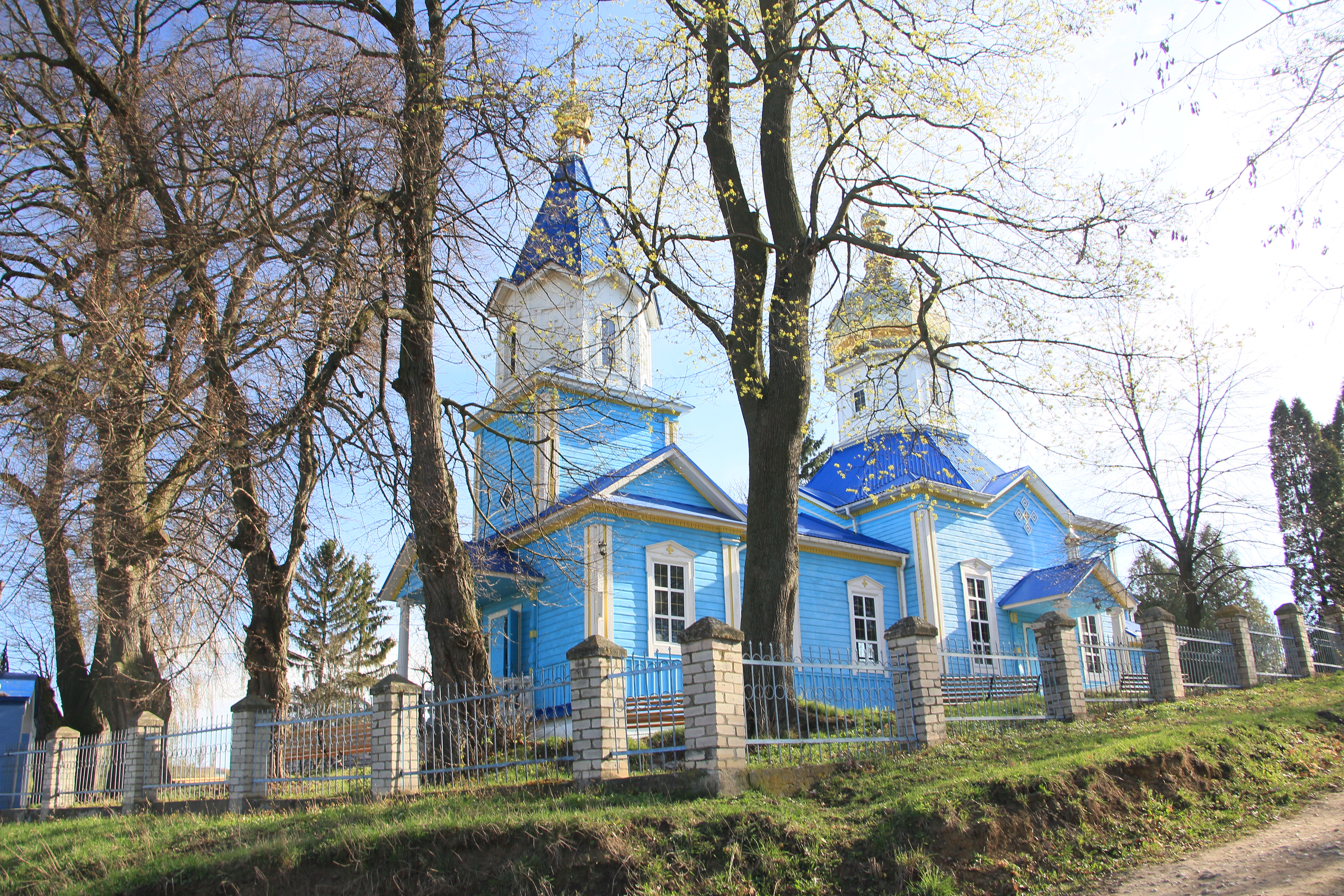 Дерев'яна церква в селі Кушлин Кременецького району Тернопільської області